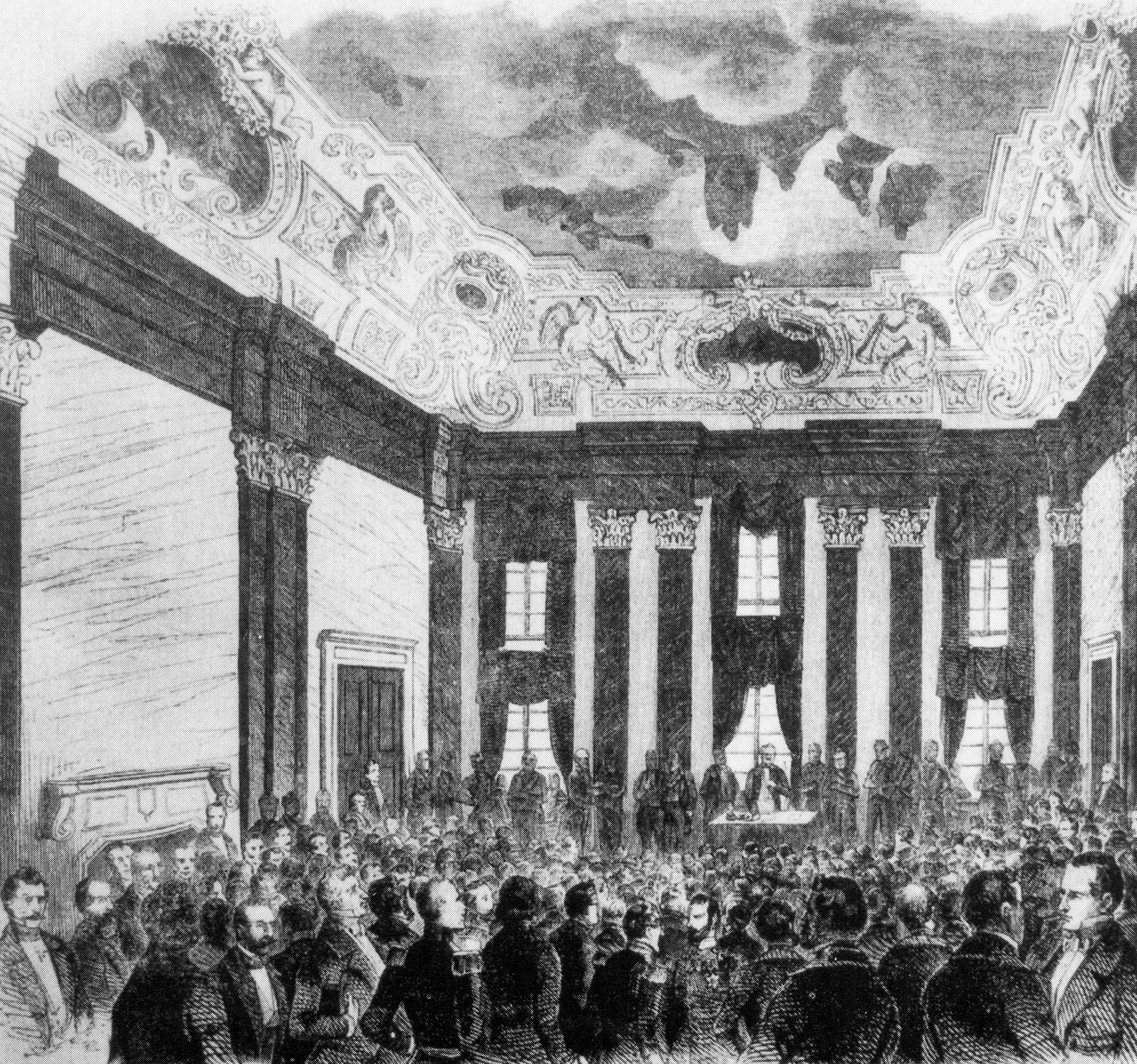 Beide Häuser. Eröffnung durch Radowitz Festsaal der Königlichen Regierung. 20 März 1850.